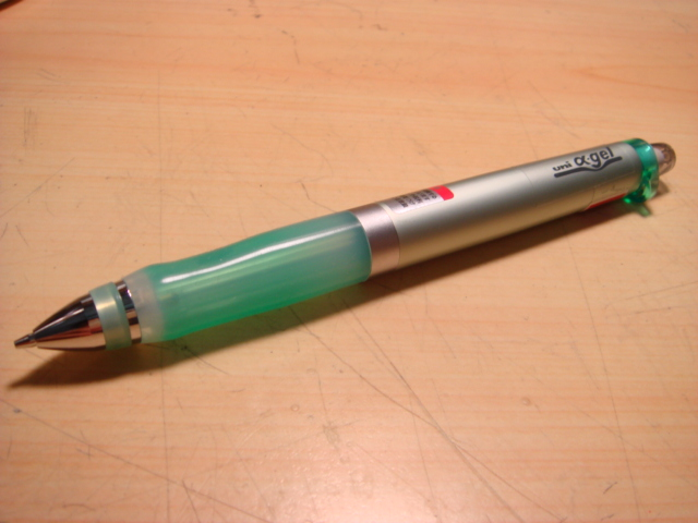 三菱α-gel自動原子筆。